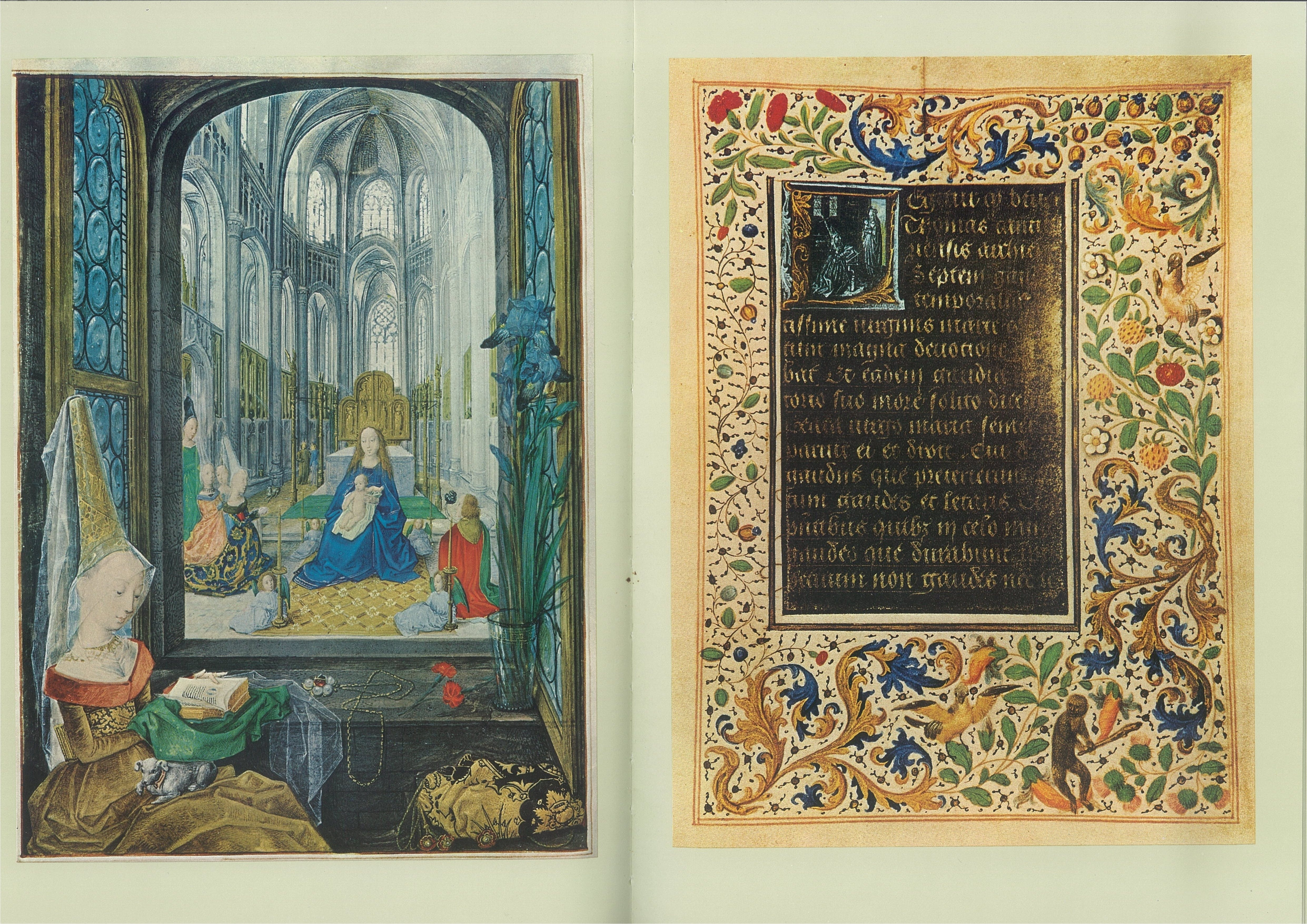 2 Miniaturen